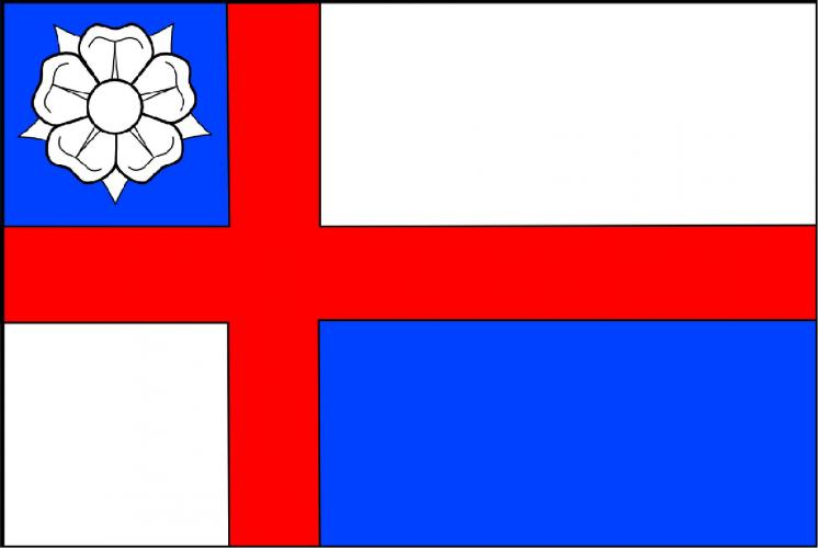 vlajka, , okres Jičín